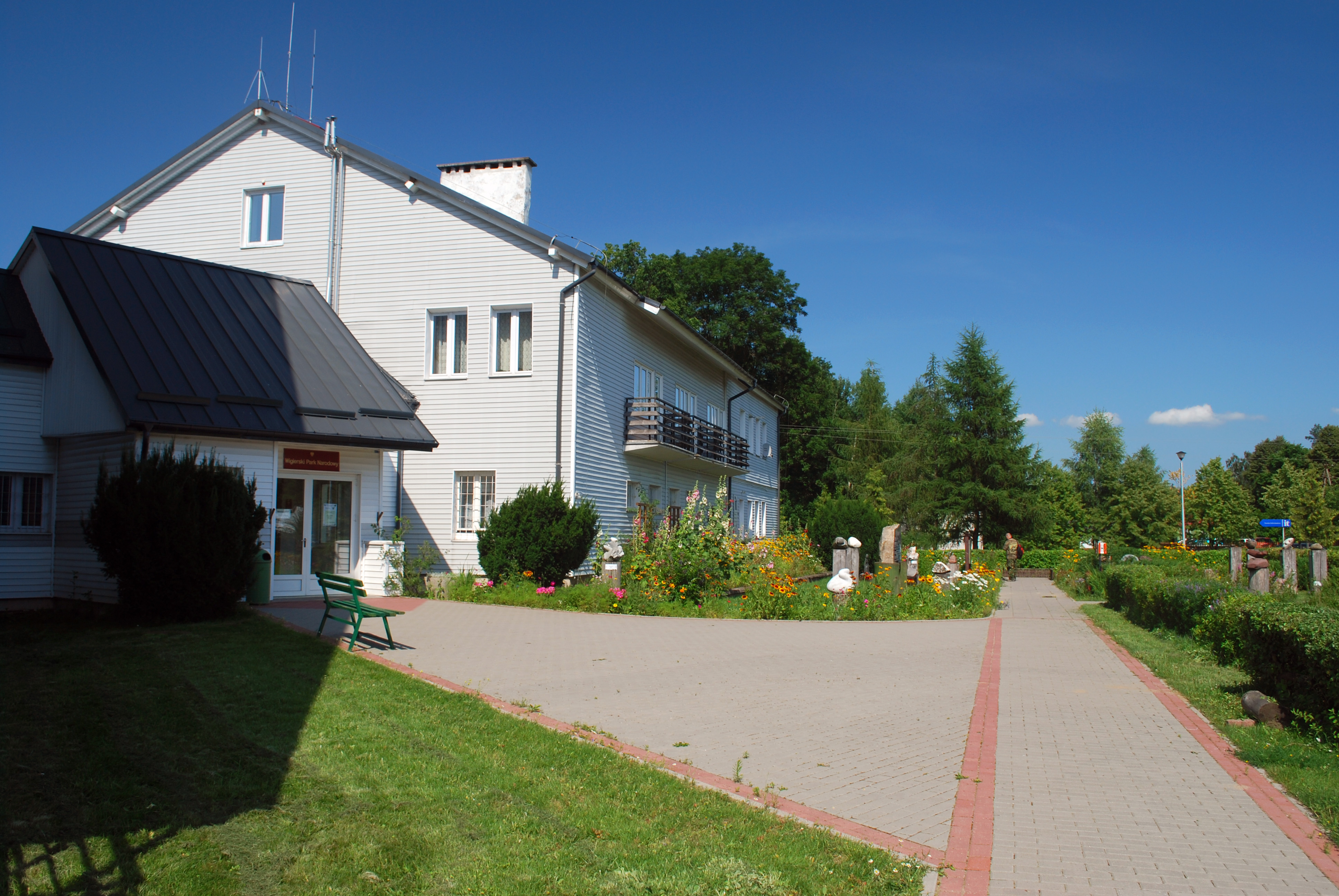 This photo from Podlaskie Voievodeship was taken during Polish Wikiexpedition 2009 set up by Wikimedia Polska Association. The making of this document was supported by Wikimedia Polska. Siedziba Wigierskiego Parku Narodowego w Krzywym, województwo podlaskie.